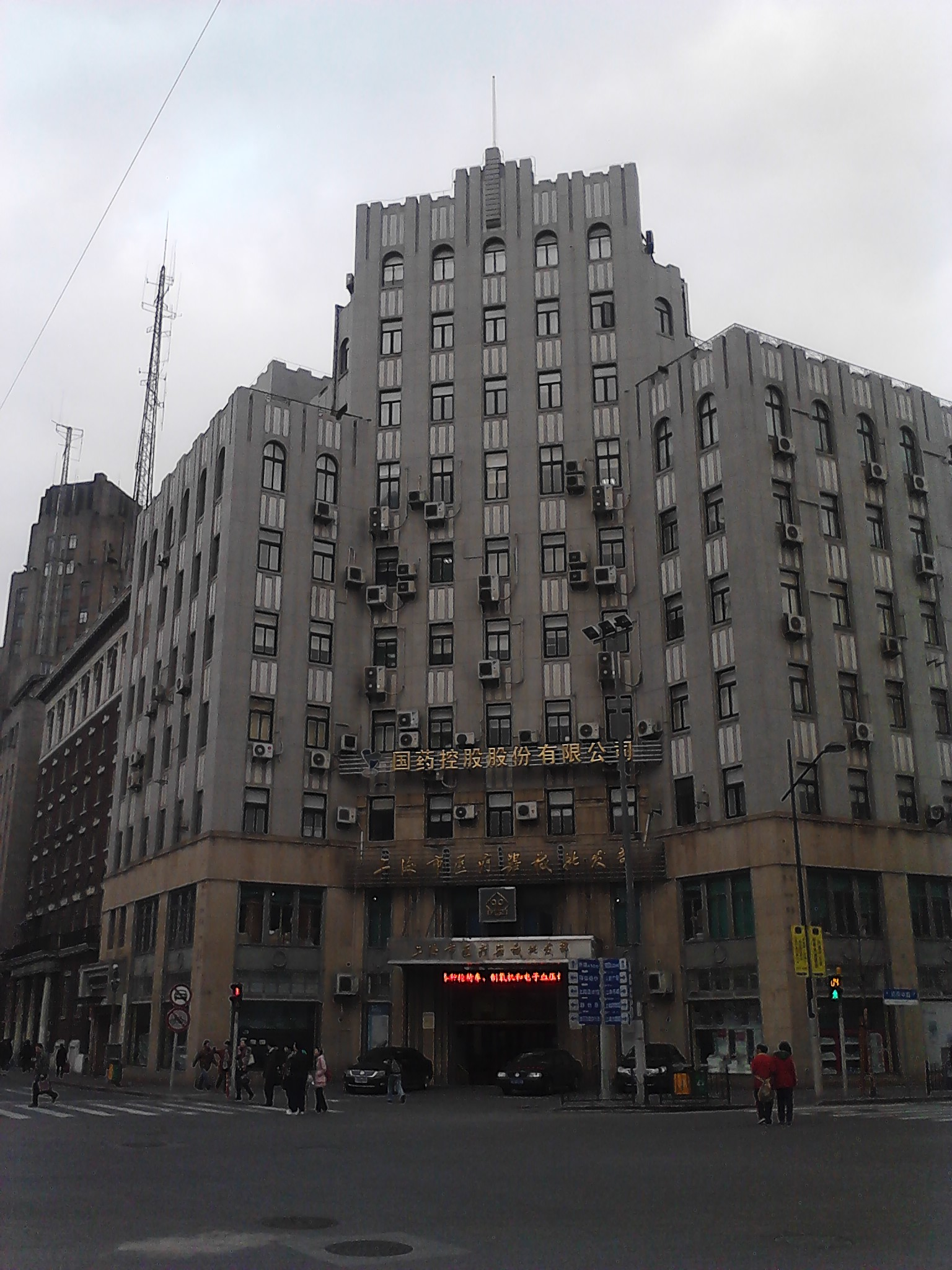 五洲大厦